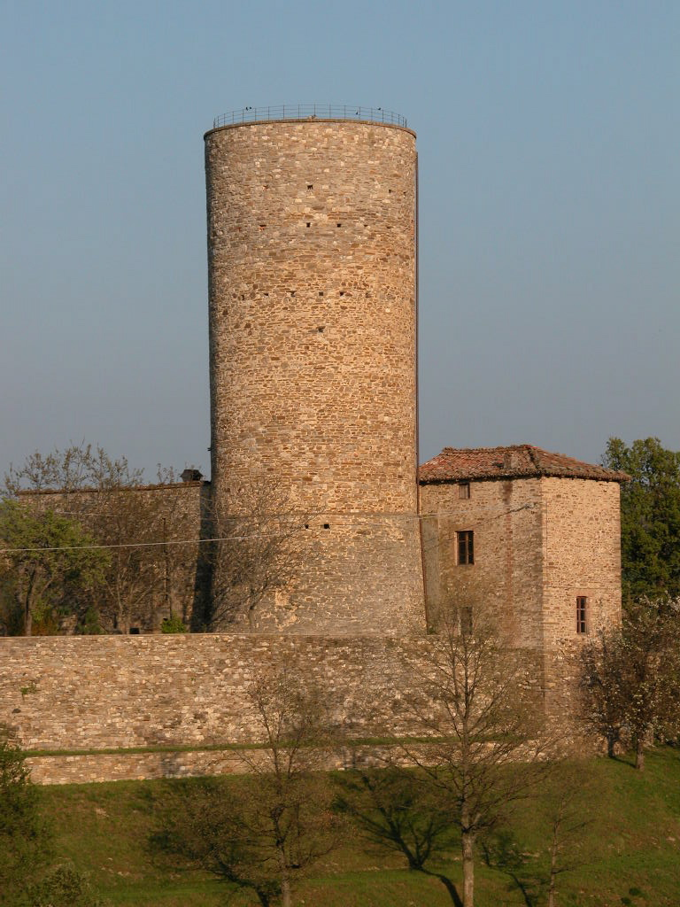 Foto mia personale, la torre di monteventano, 2006